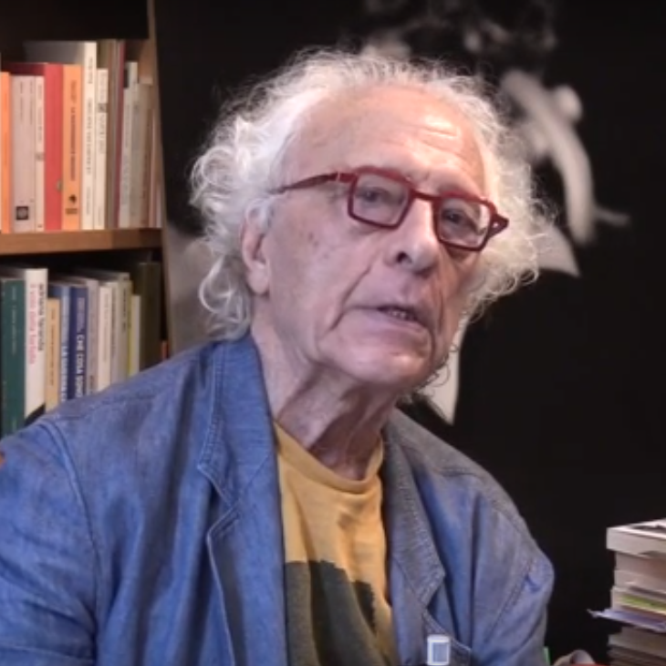 Giampiero Mughini intervistato da Emilio Targia sul suo ultimo libro "Memorie di un rinnegato" (Roma, 20/06/2019)